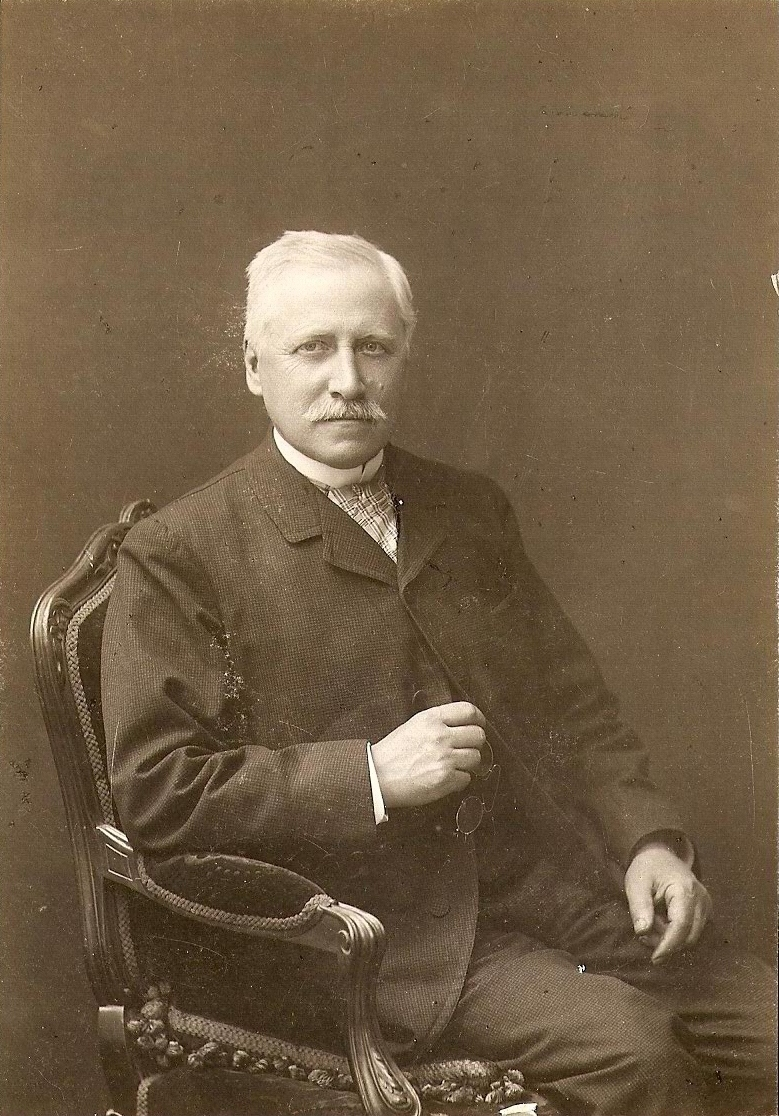 Joseph Cabasson aquarelliste école provençale 1841-1920